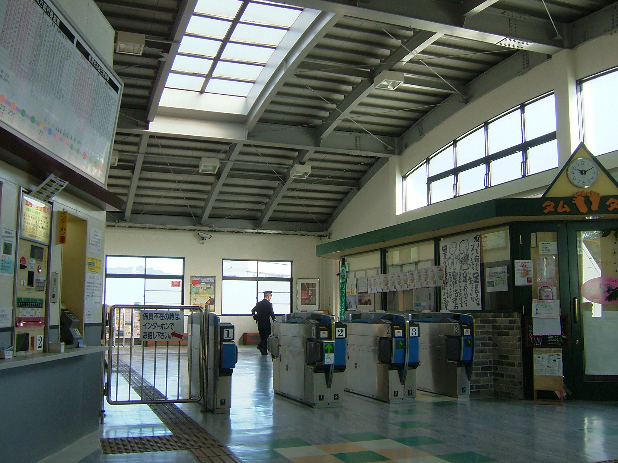 静岡鉄道狐ヶ崎駅改札口